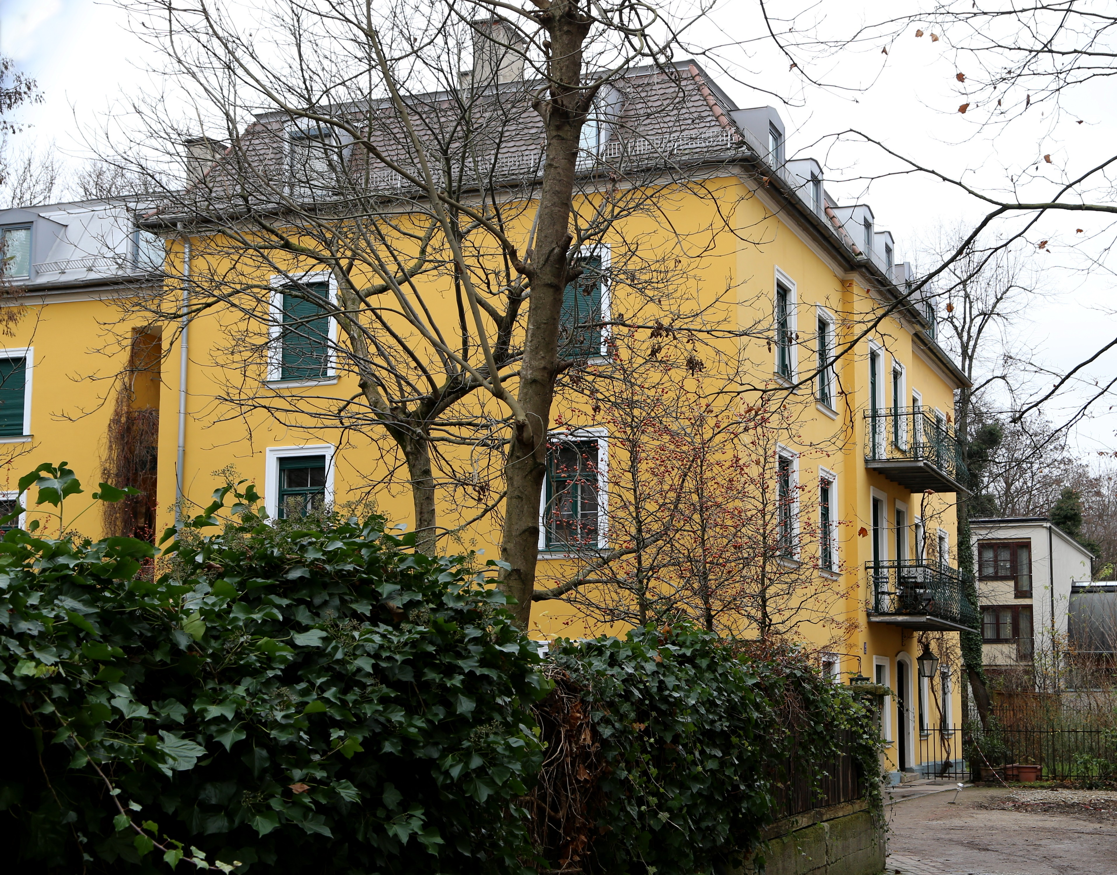 Friedrichstraße 4; Gartenhaus, Neurenaissance, Ende 19. Jh.; Wohnhaus des Philosophen Theodor Lipps 1894–1908 und des Malers Franz Marc 1907–08.